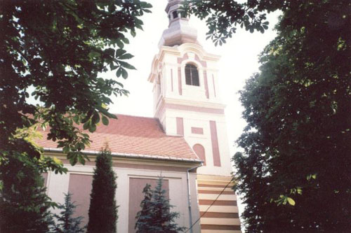 Nemesapáti, Szent Miklós római katolikus templom